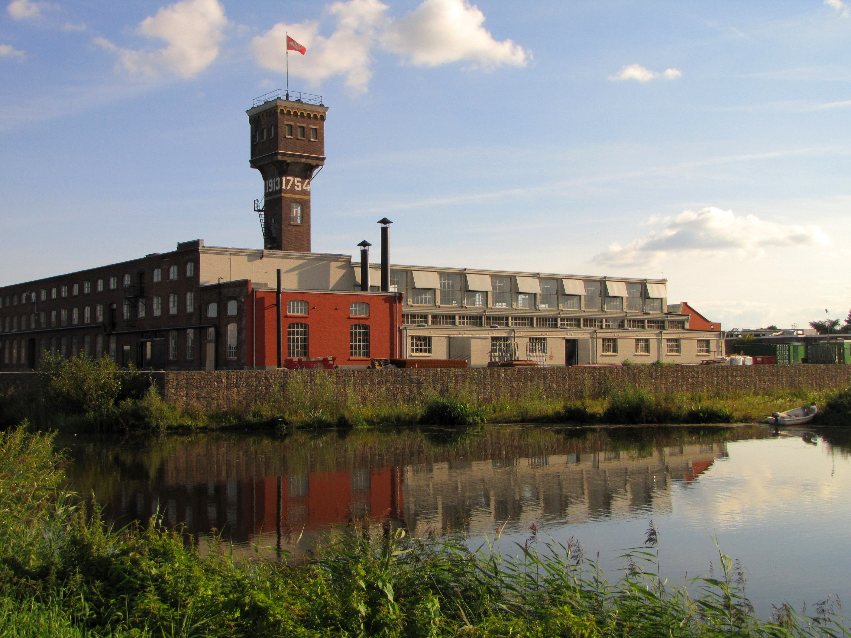 Noorderkant van het Beltmancomplex, met de Watertoren, aan de Oude IJssel in Ulft.